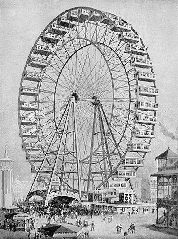 Riesenrad